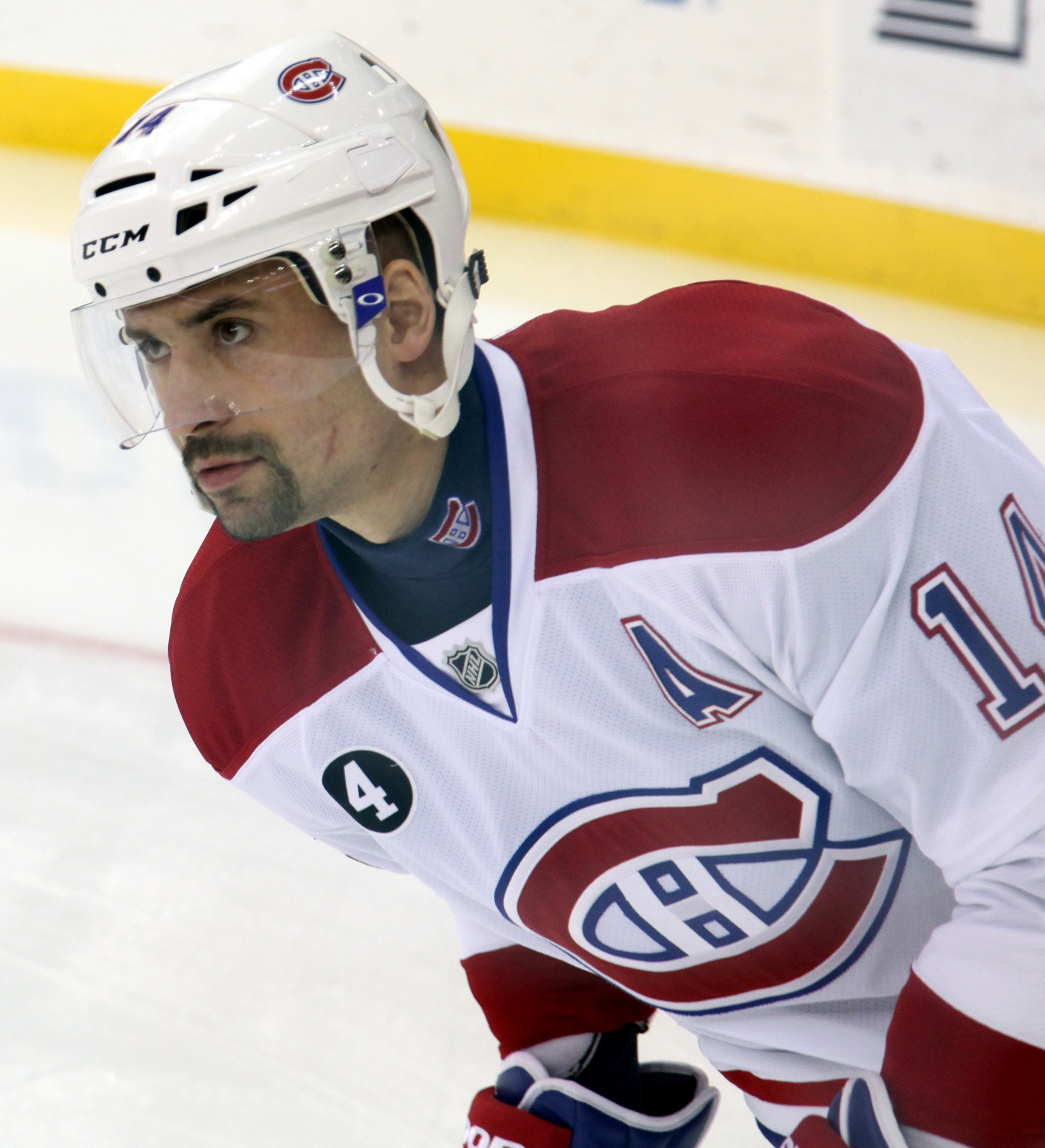 Tomas Plekanec in January 2015.